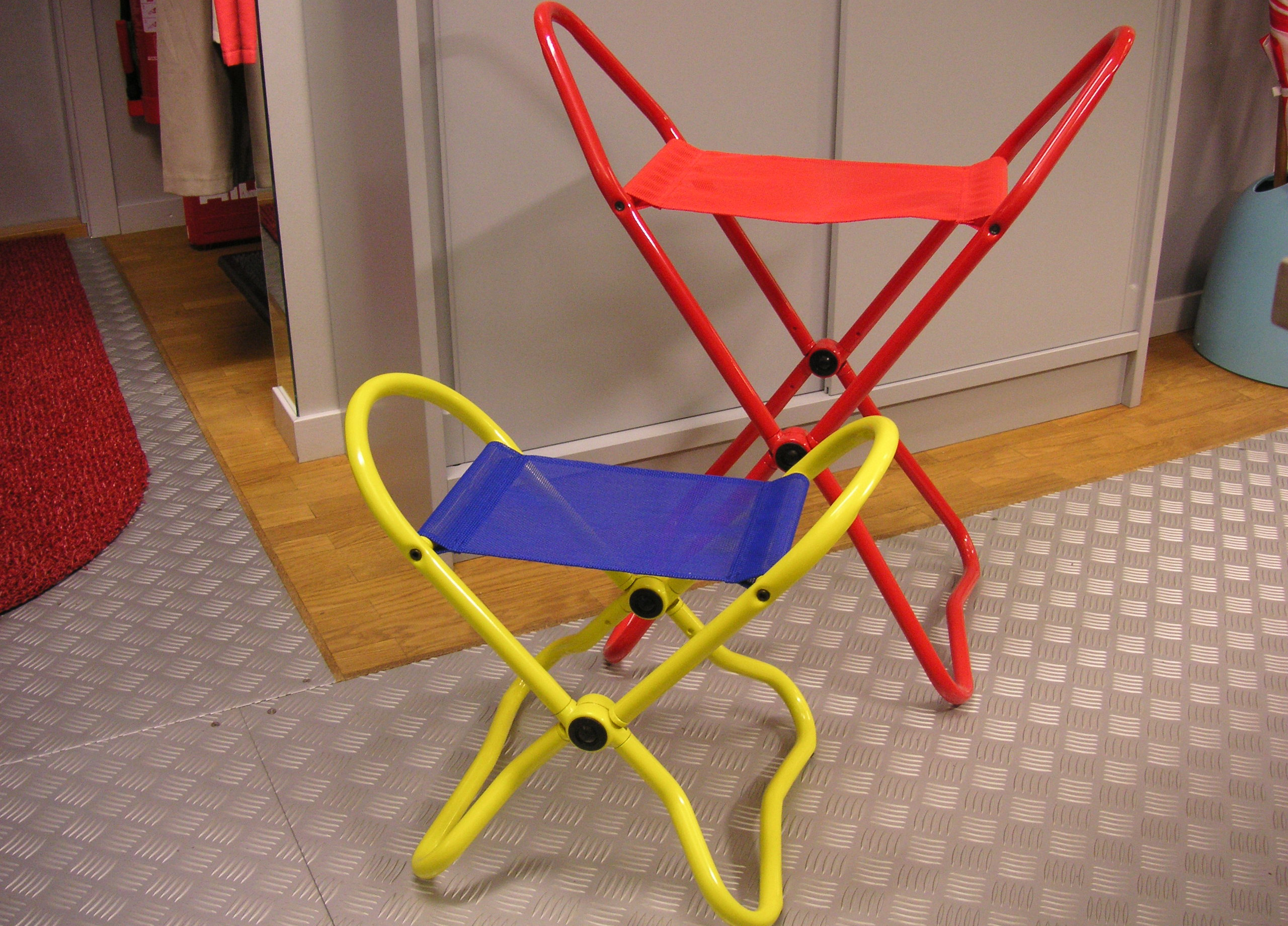 Museumspallen "Stockholm II" (röd) i bakgrunden och barnpallen "Snupi"